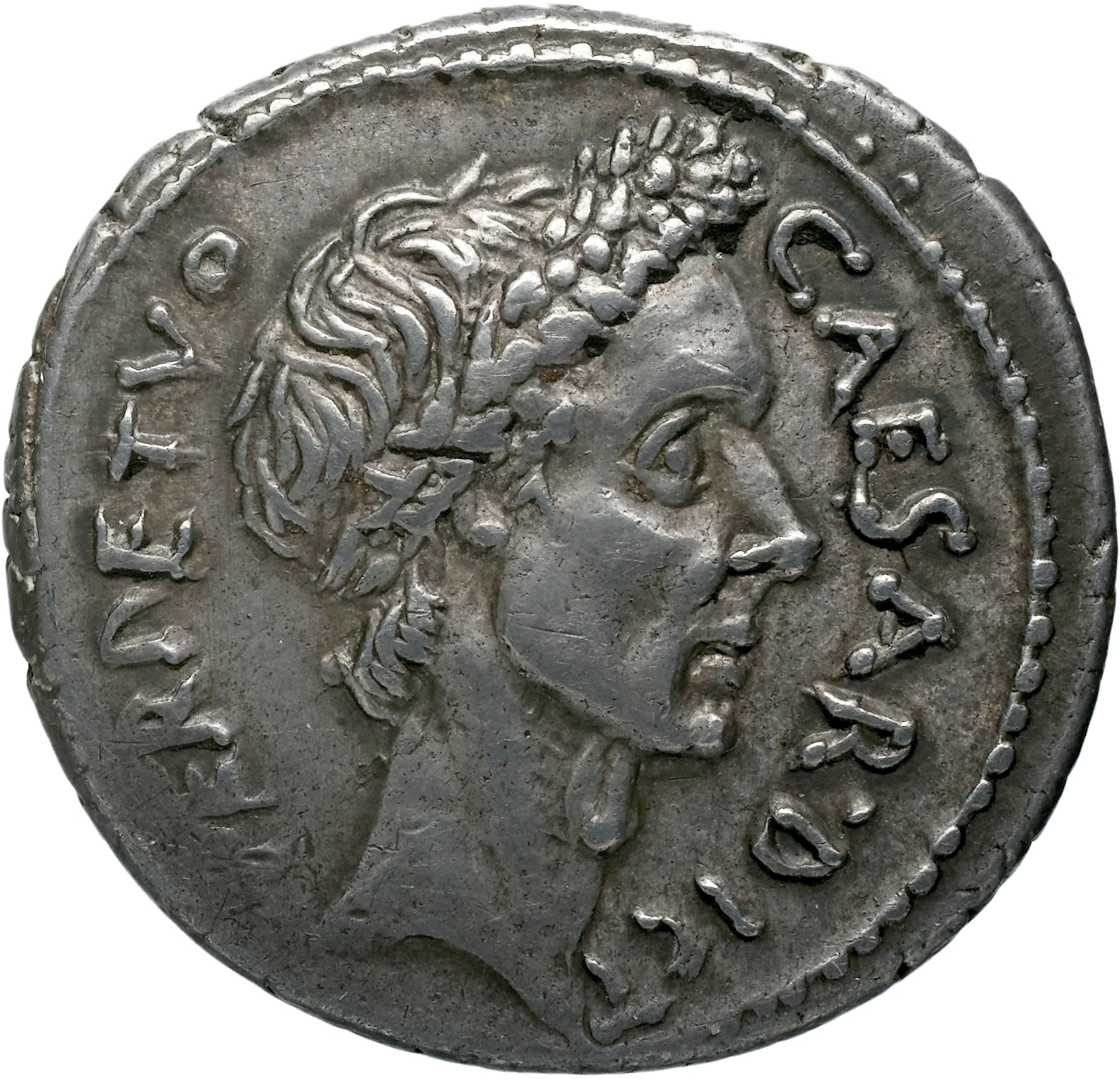 Denier à l'effigie de Jules César lauré, 43 av-J.C. Argent, 4,01 gr. Avers : CAESAR DICT – PERPETVO - Cæsar Dictator Perpertuo (César dictateur perpétuel). RRC 480/6 – B.37 (Julia) – CRR.1063 - Collection BnF : REP-4805